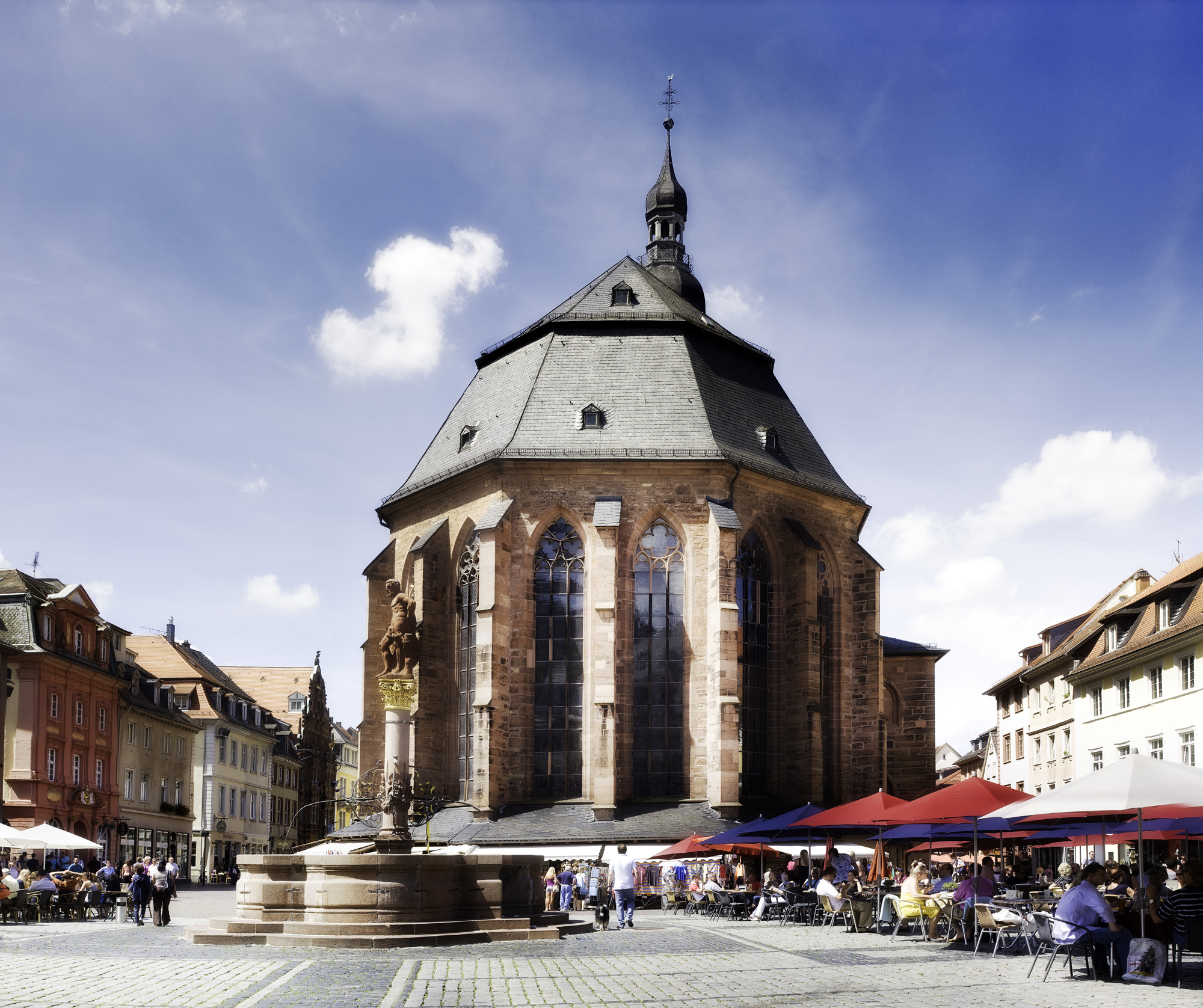 The Heiliggeistkirche of Heidelberg